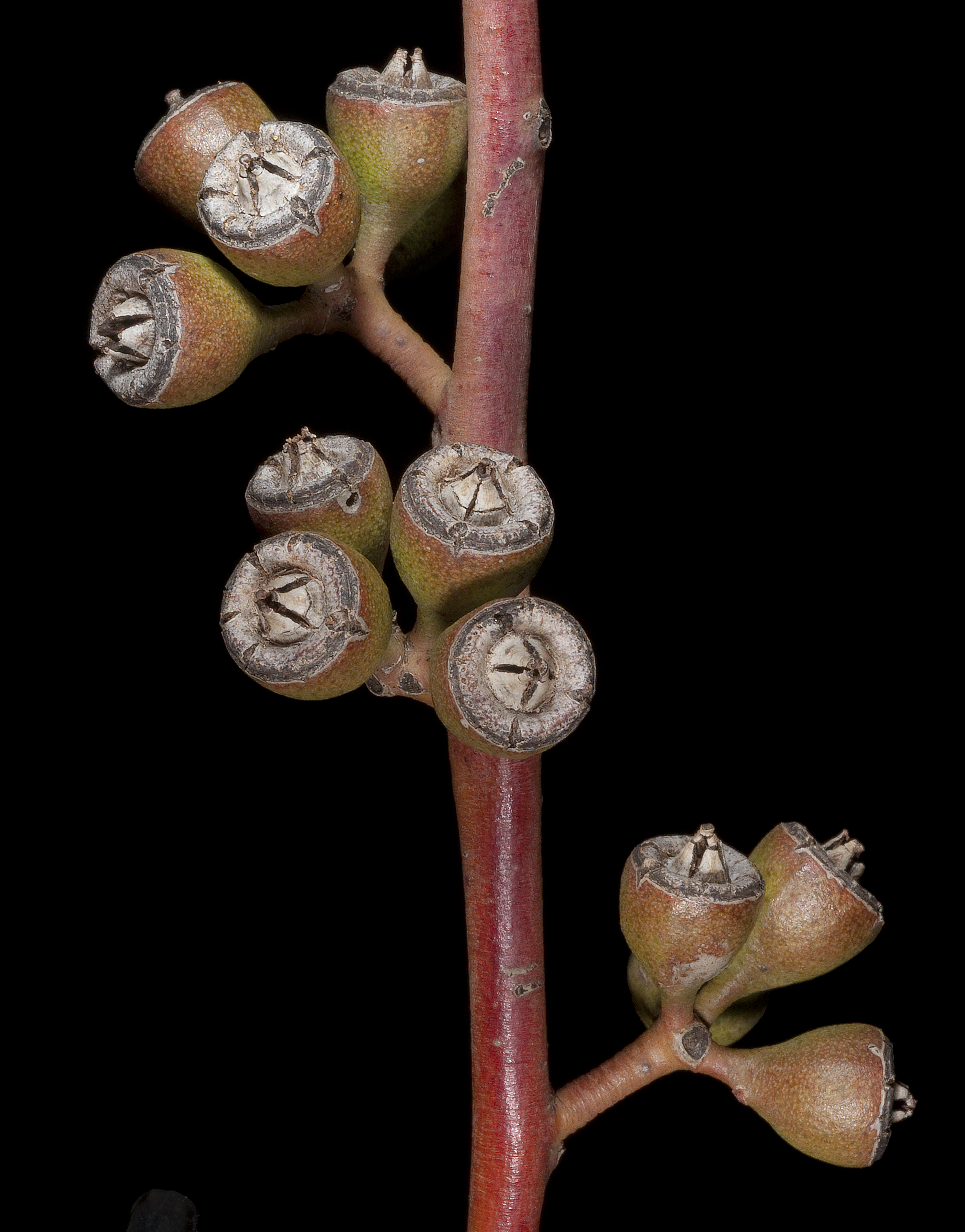 KRT3970